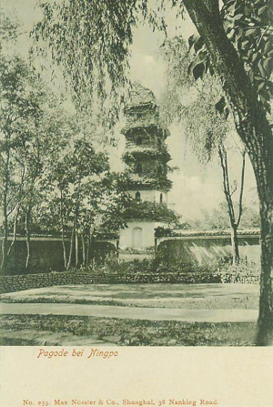 德国摄影家恩斯特·柏石曼拍摄的宁波天宁寺西塔，发表于上海